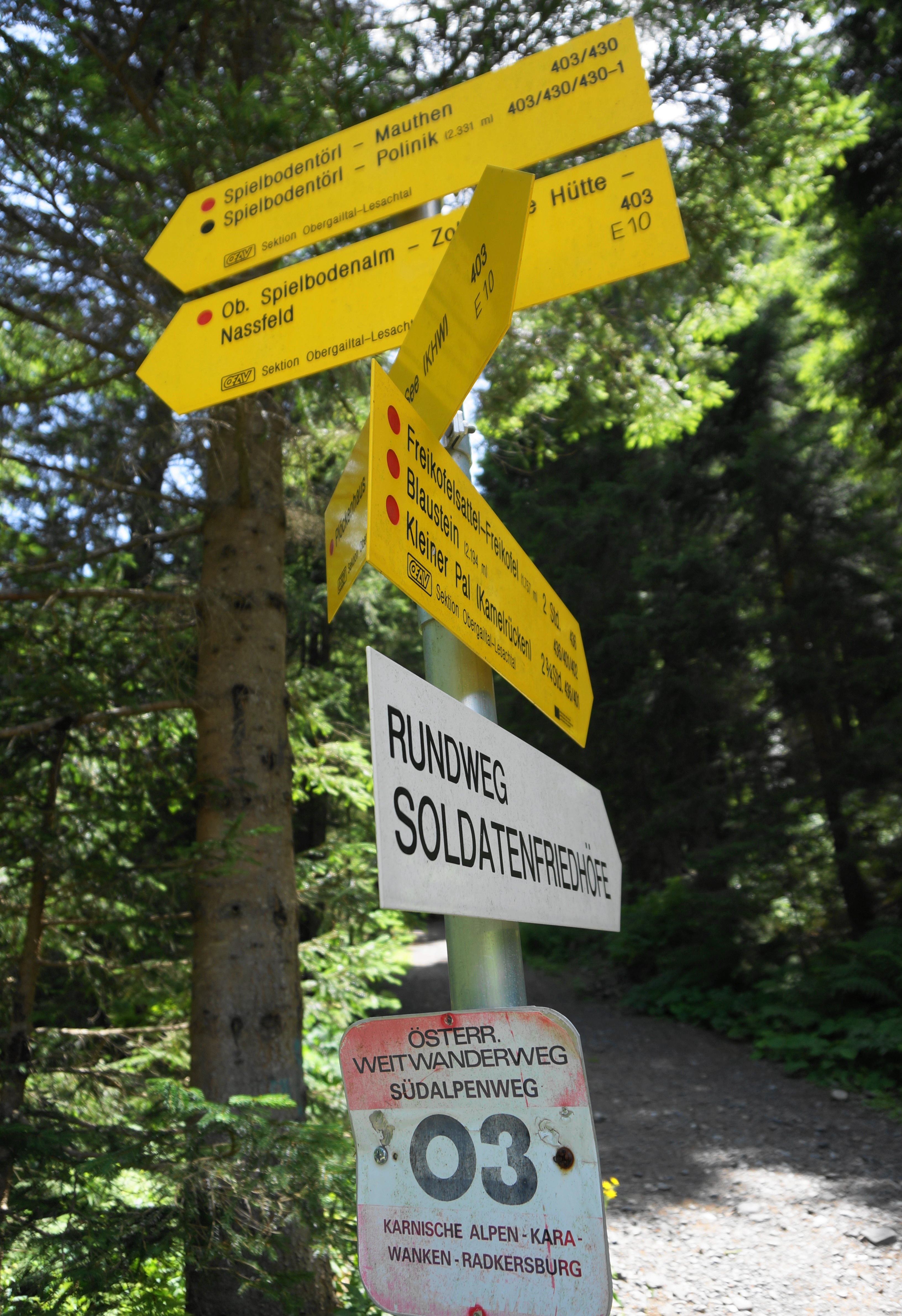 Wegweiser Soldatenfriedhöfe Historischer Rundwanderung 1915-1917, Sentiero storico und Österr. Weitwanderweg 03 Südalpen von den Karnischen Alpen über die Karawanken bis Radkersburg in der Steiermark, Österreich, EU